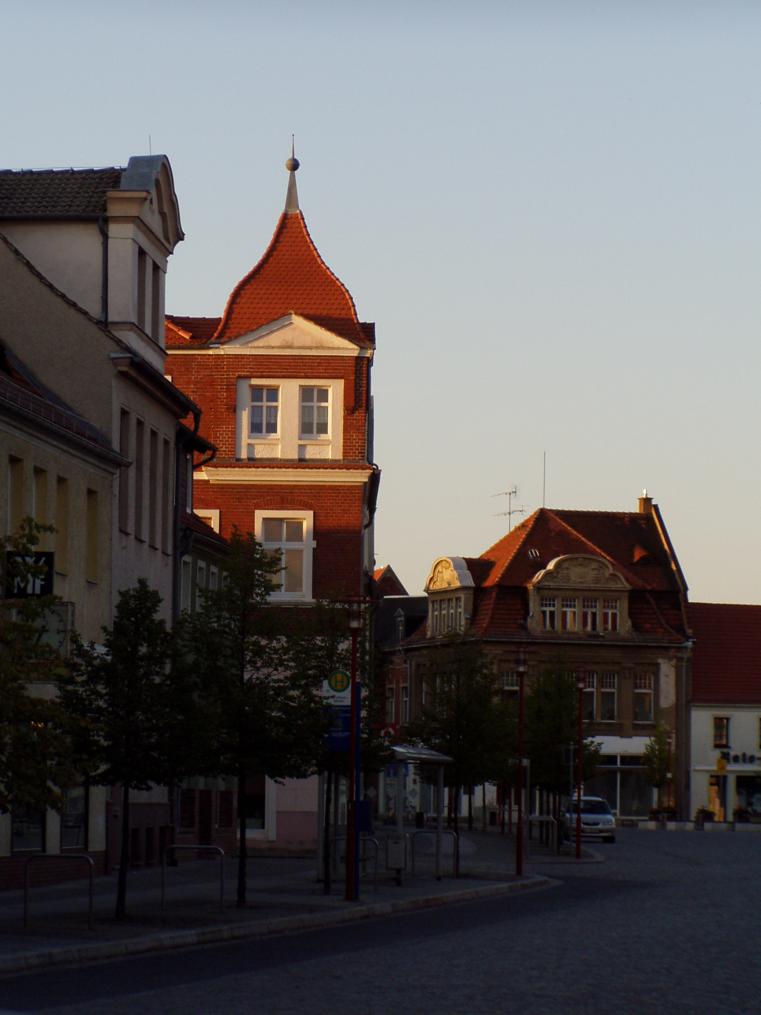 Am Markt in Kirchhain am Sonntag Abend, Rechts: Geschäftshaus